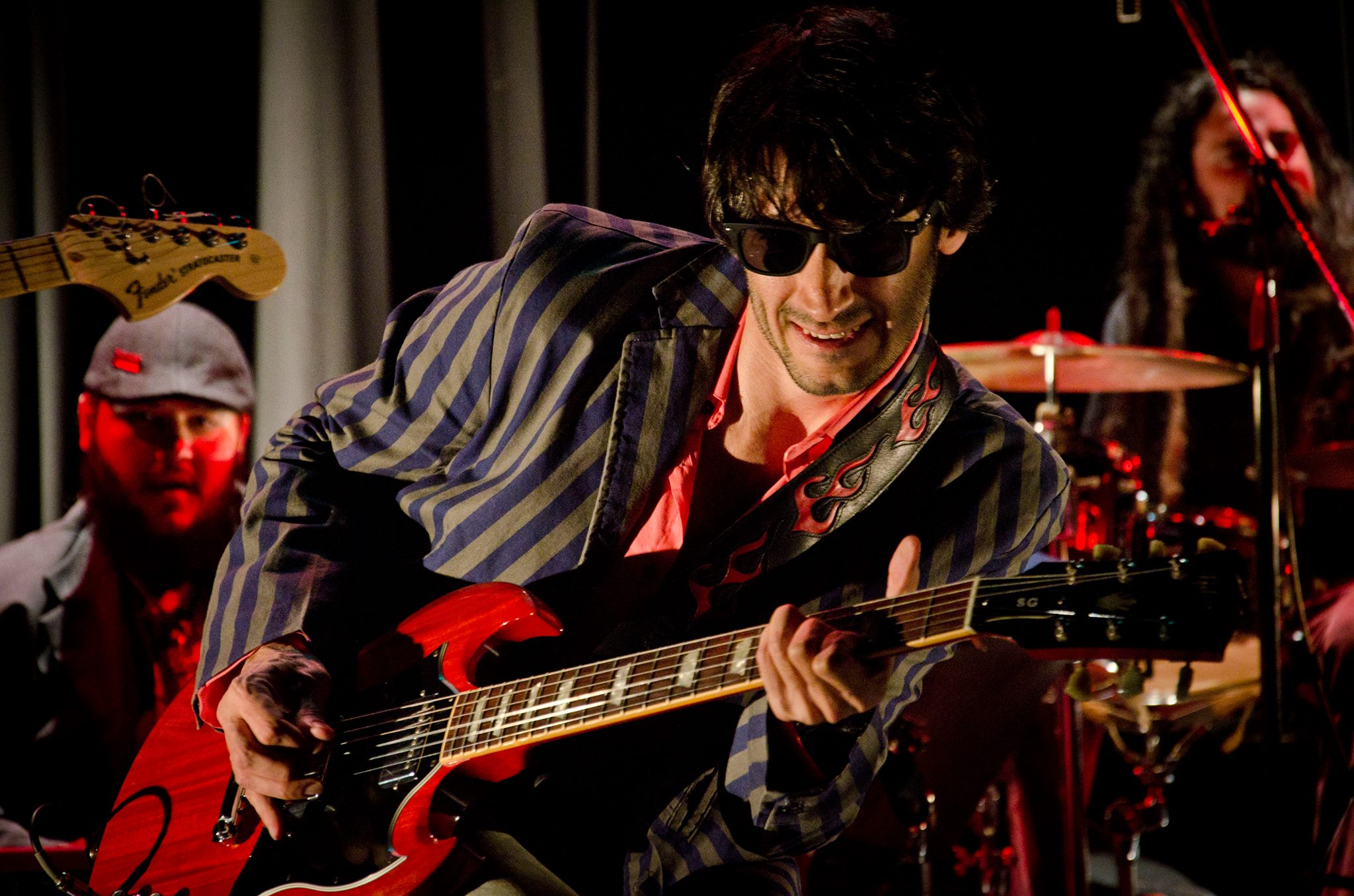 Leo Ferradás en un show